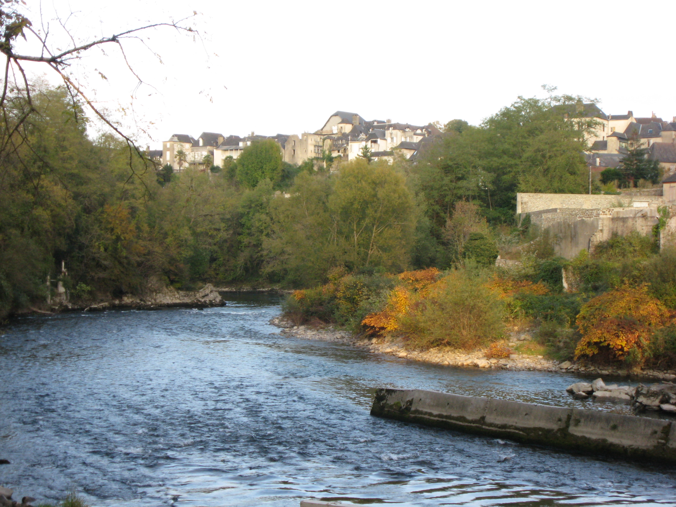 Confluent des gaves d'Aspe et d'Ossau pour former le gave d'Oloron (Pyrénées).